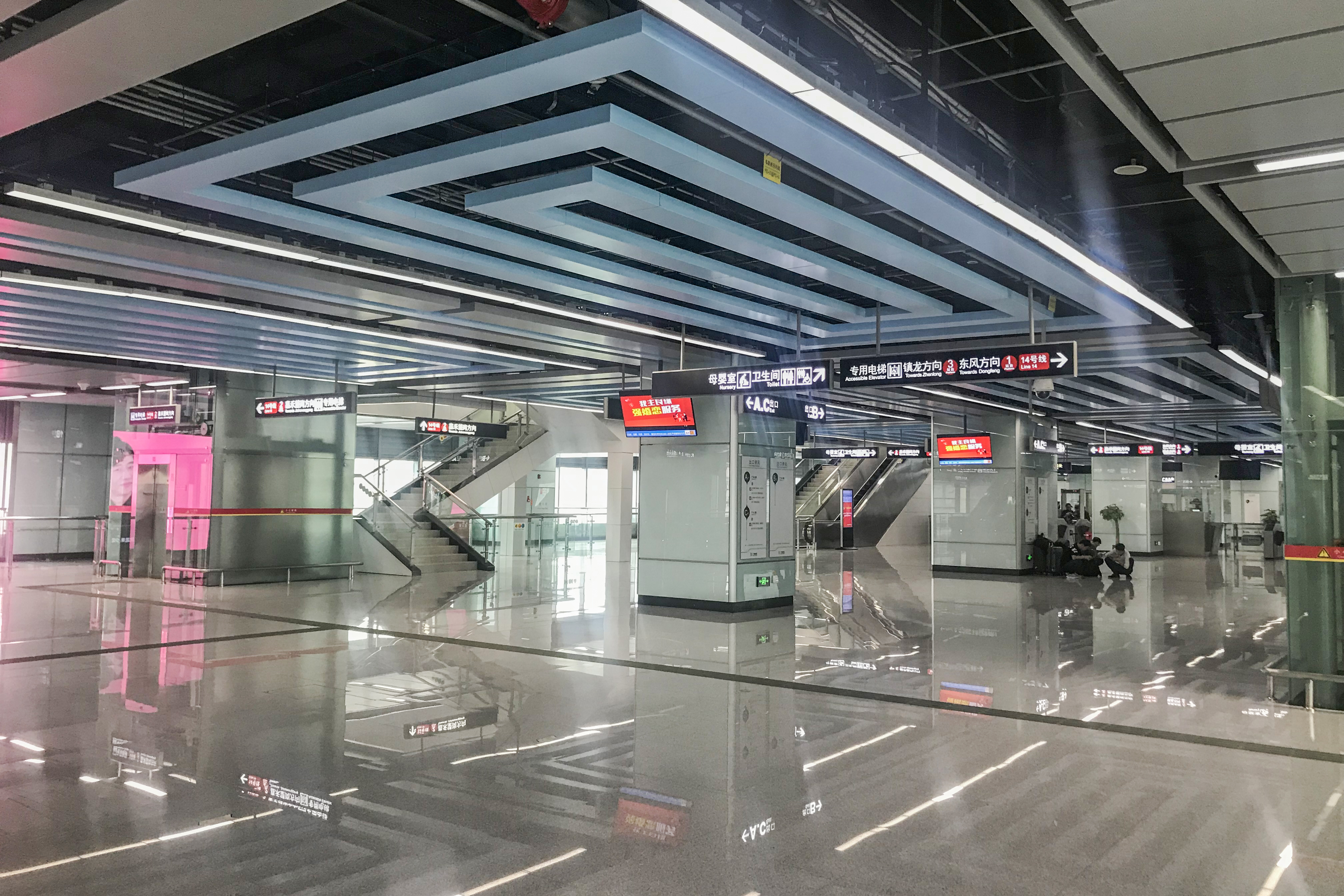 广州地铁新和站